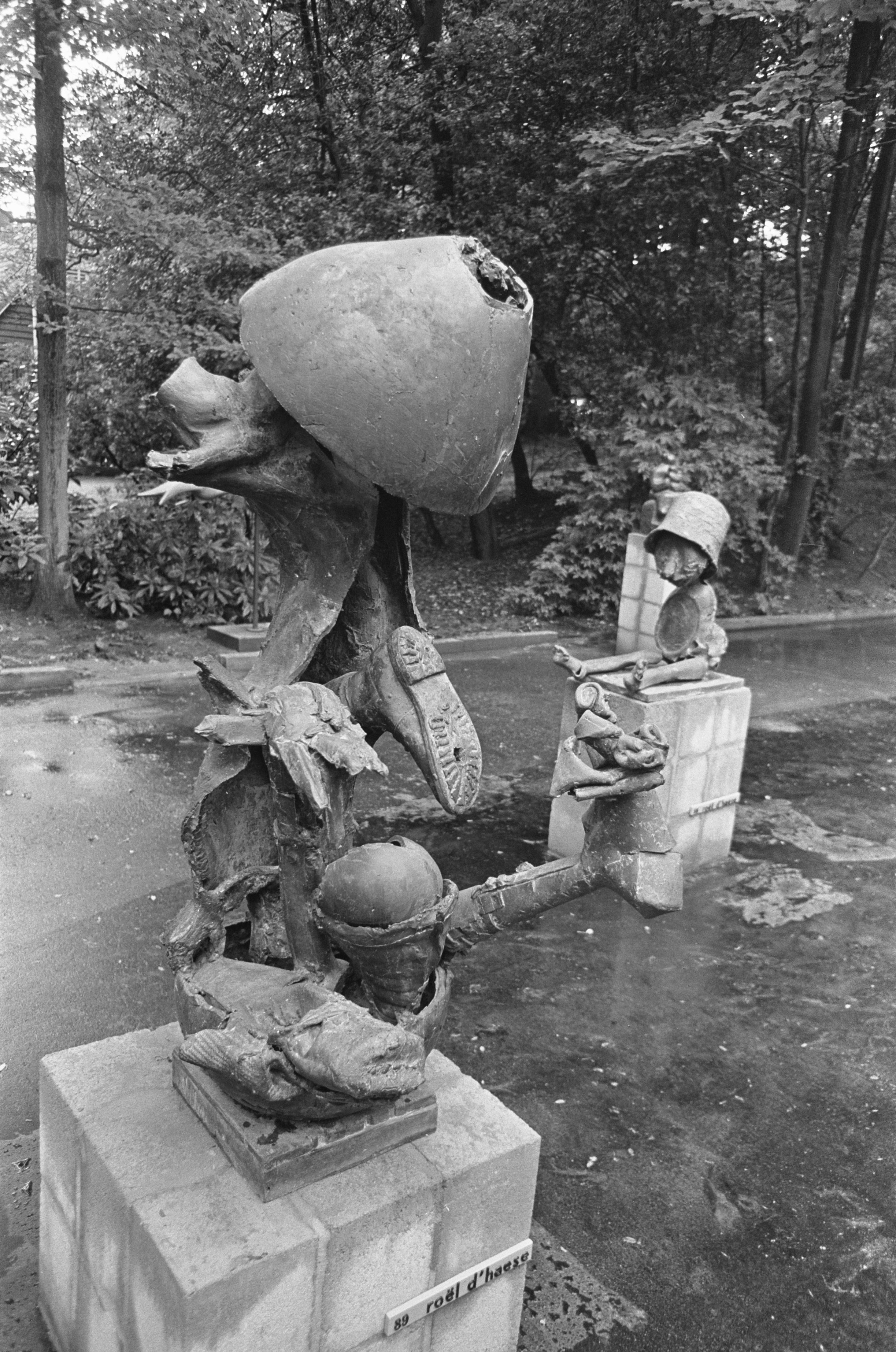 Opening beeldententoonstelling in Sonsbeek, Roel d'Haese (België), beeld aan Lumumba Datum 26 mei 1966 Locatie Arnhem